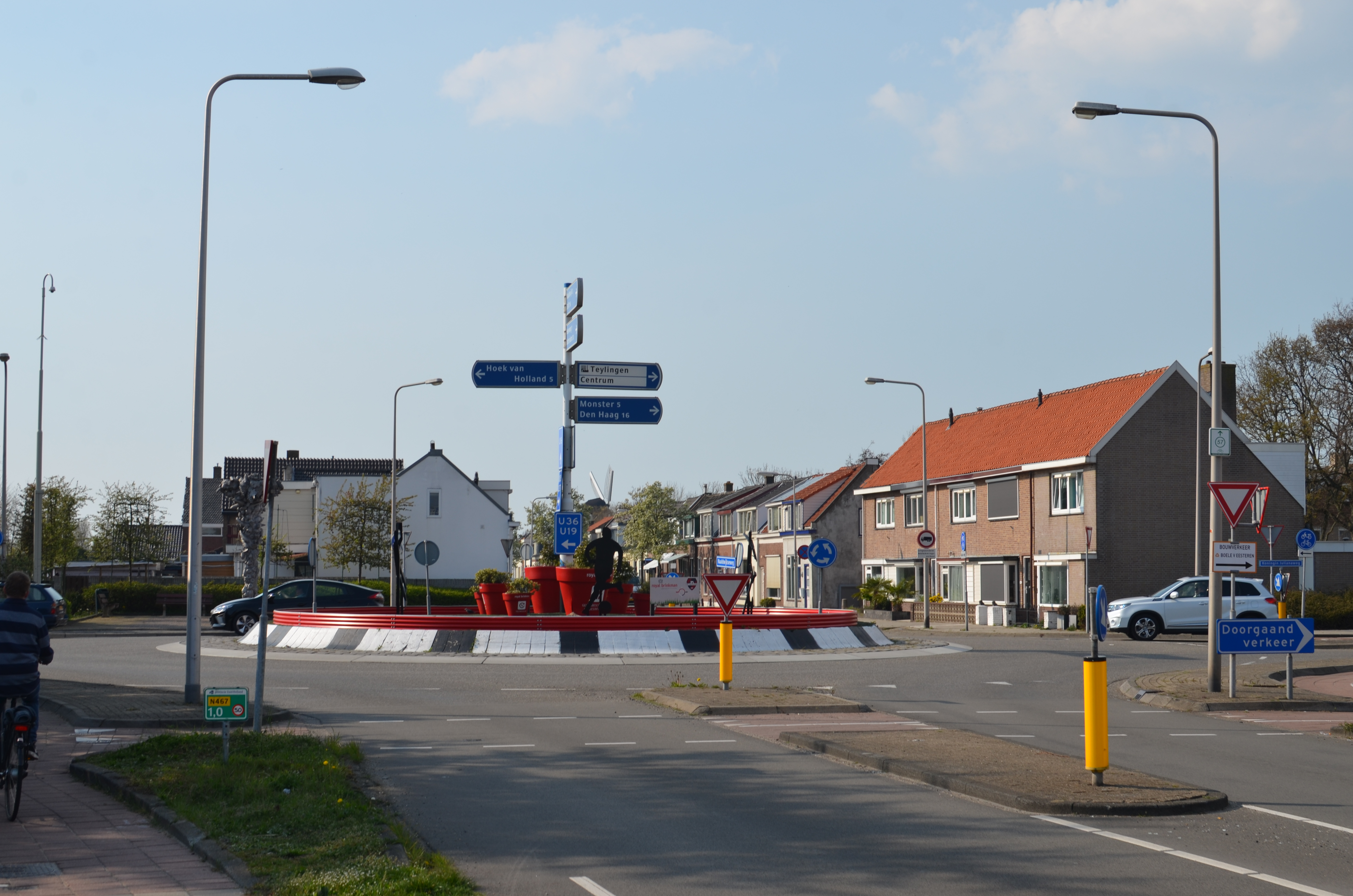 De rotonde bij de Koningin Julianaweg / Naaldwijkseweg in 's Gravenzande.